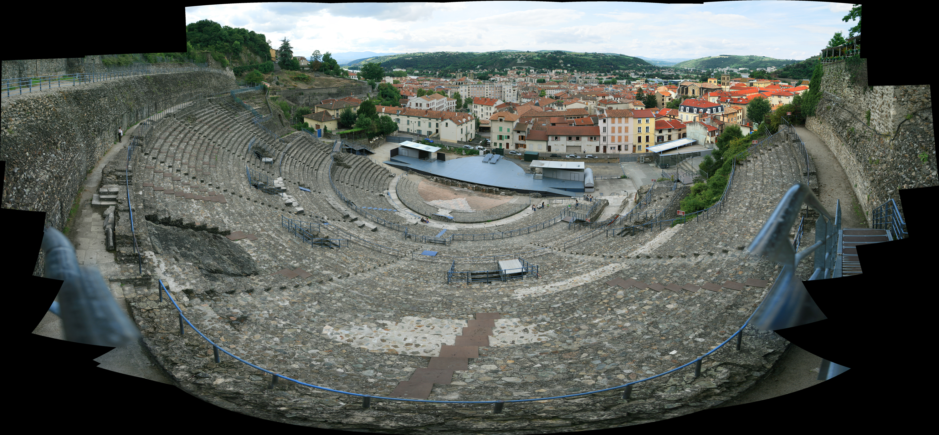 Panoramique montrant la cavea du théâtre antique de Vienne (38), depuis le déambulatoire supérieur nord.